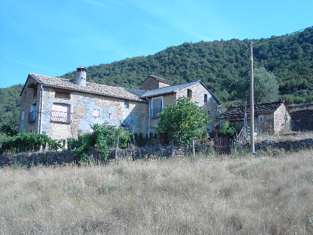 El caserío de Fontanal, en el municipio altoaragonés de Labuerda.